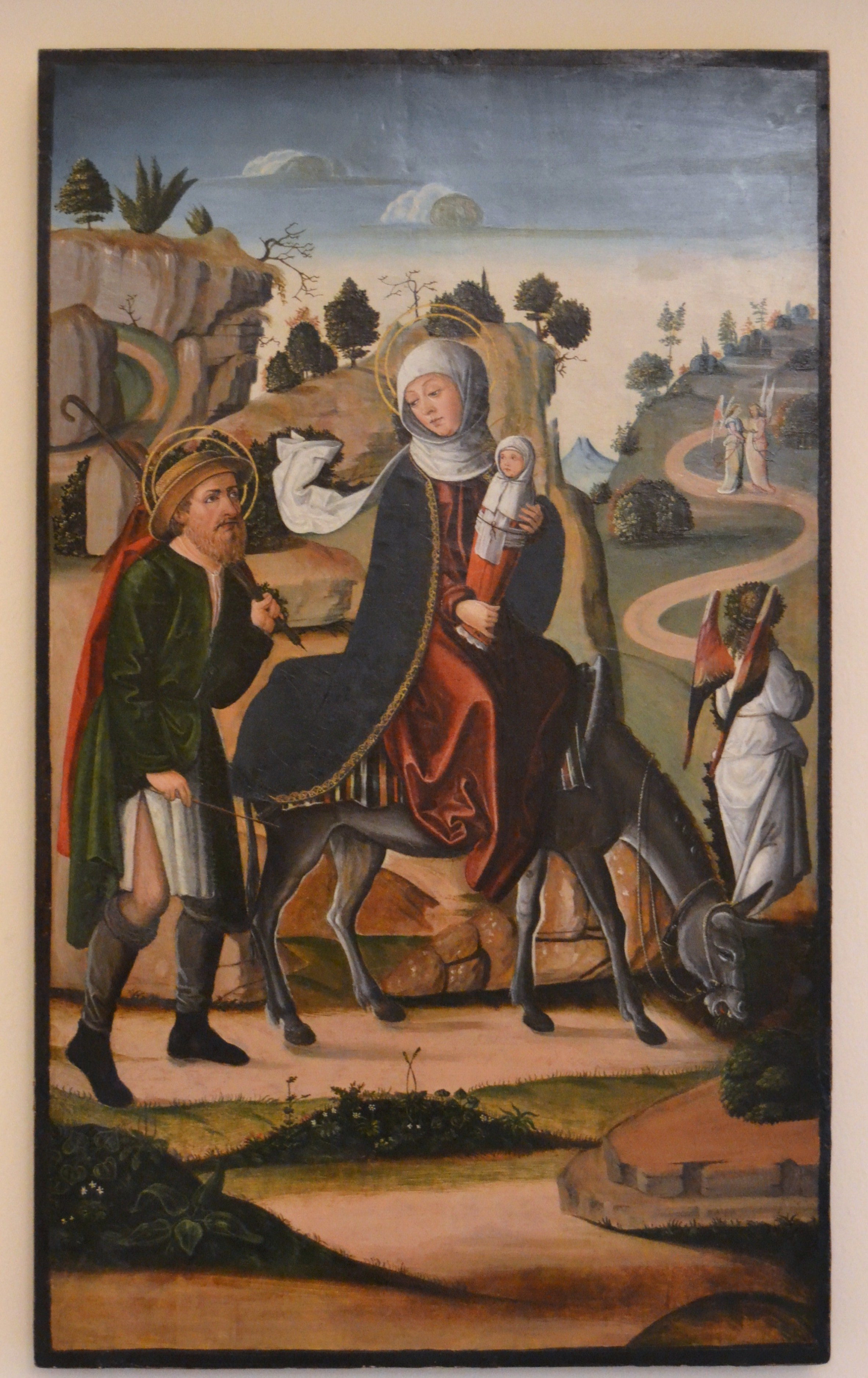 Taula solta d'un desaparegut retaule, de petites proporcions, dedicat molt possiblement a la vida de Maria, del qual només resta aquesta taula i un fragment de polsera amb els dos monjos cartoixans. Procedent, sense cap dubte, de la cartoixa de Vall de Crist, la taula arriba al Museu per mitjà del col·leccionista Gonzalo Valero. Es concep en un paisatge obert, amb muntanyes amb talls de roques fantàstiques, arbres i plantes. Un camí es perd en llunyania entre suaus corbes i per ell discorren àngels en amigable conversa. En primer terme, la Verge cavalca sobre l'ase i torna el seu rostre cap a Sant Josep que camina darrere. Maria porta en els seus braços al Nen. Sant Josep porta tubrucos, camisa, aljuba i capa sense capillo. Cobreix el cap amb capell de sol i porta el garrot a l'espatlla i, en la seua mà dreta, una vareta. El ruquet s'atura i rosega les herbes del sender. un àngel acompanyant els precedeix, mentre altres dos, més avançats en el camí, es detenen, es tornen i conversen entre si.